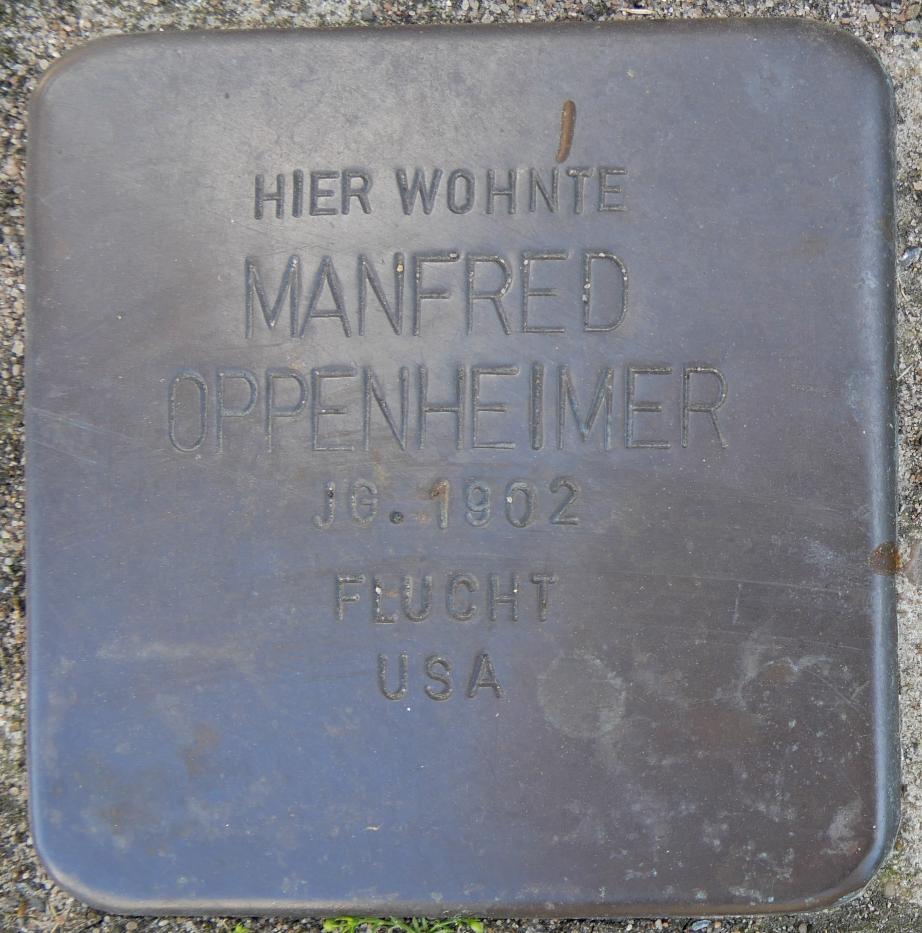 Stolpersteine Wesel: Oppenheimer, Manfred